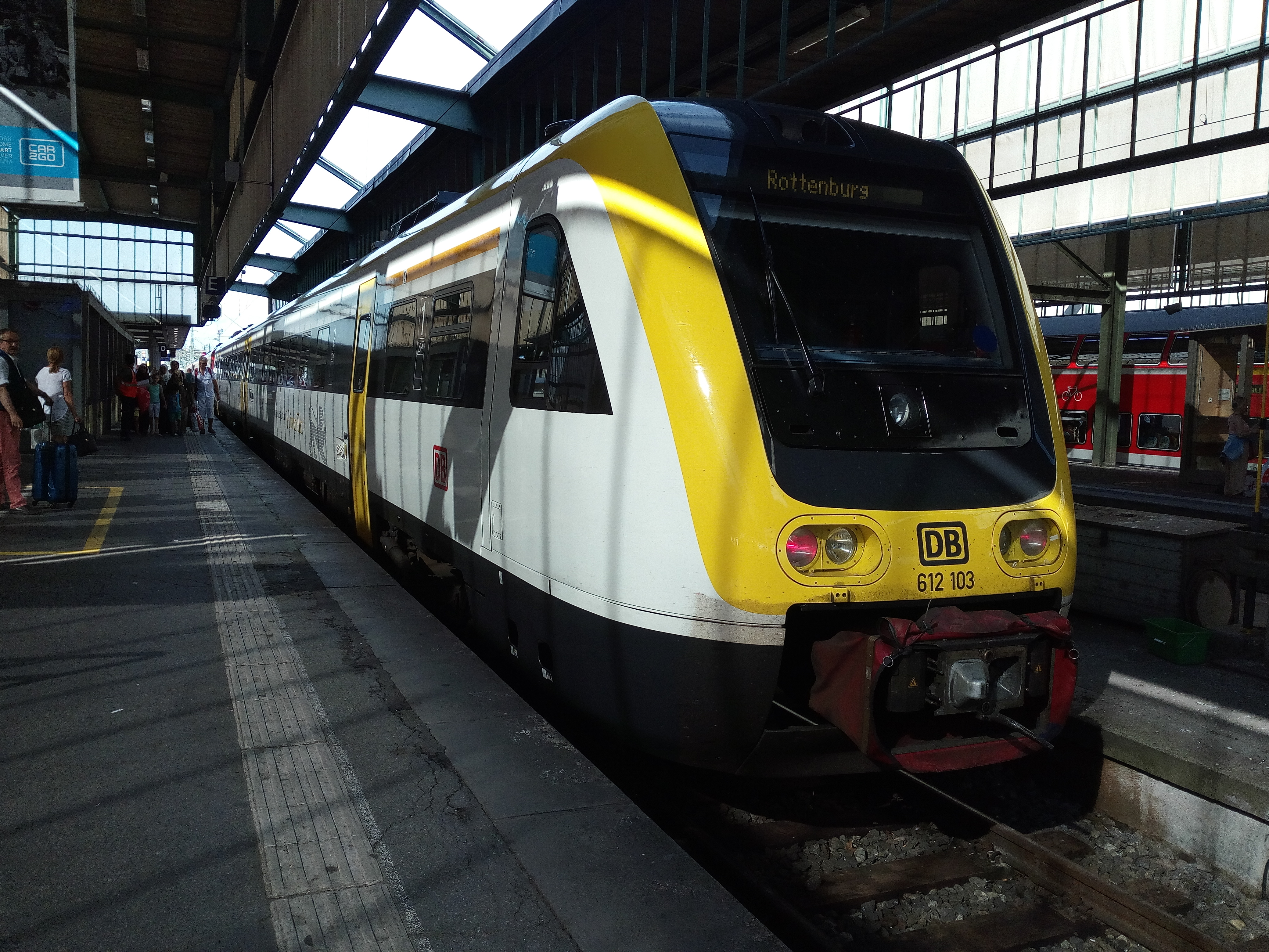 Eine Br 612 von bwegt im Stuttgarter Hbf.